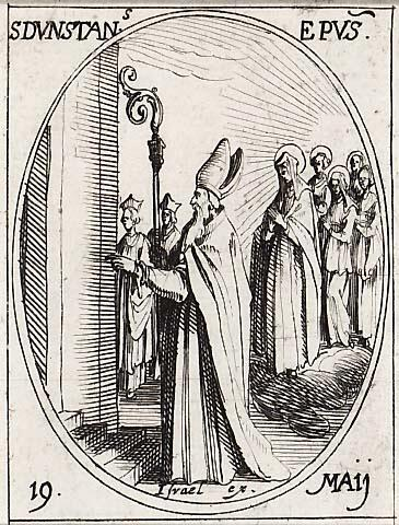 San Dunstano in una stampa secentesca di Jacques Callot.